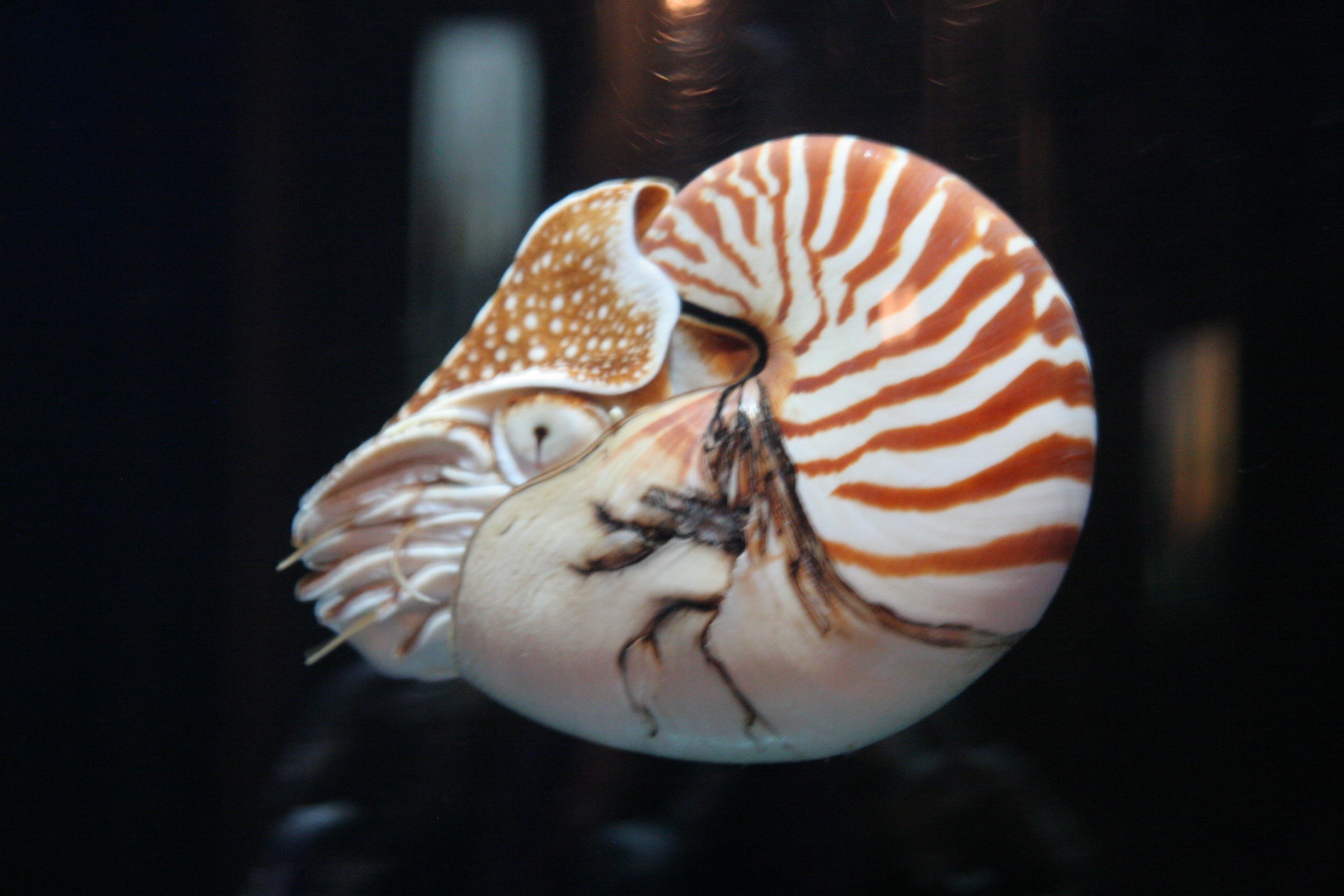 Montpellier Aquarium April 2013